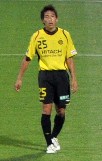 Kashiwa 0 - 3 Tokyo (Goals: Ishikawa, Cabore, Hirayama)